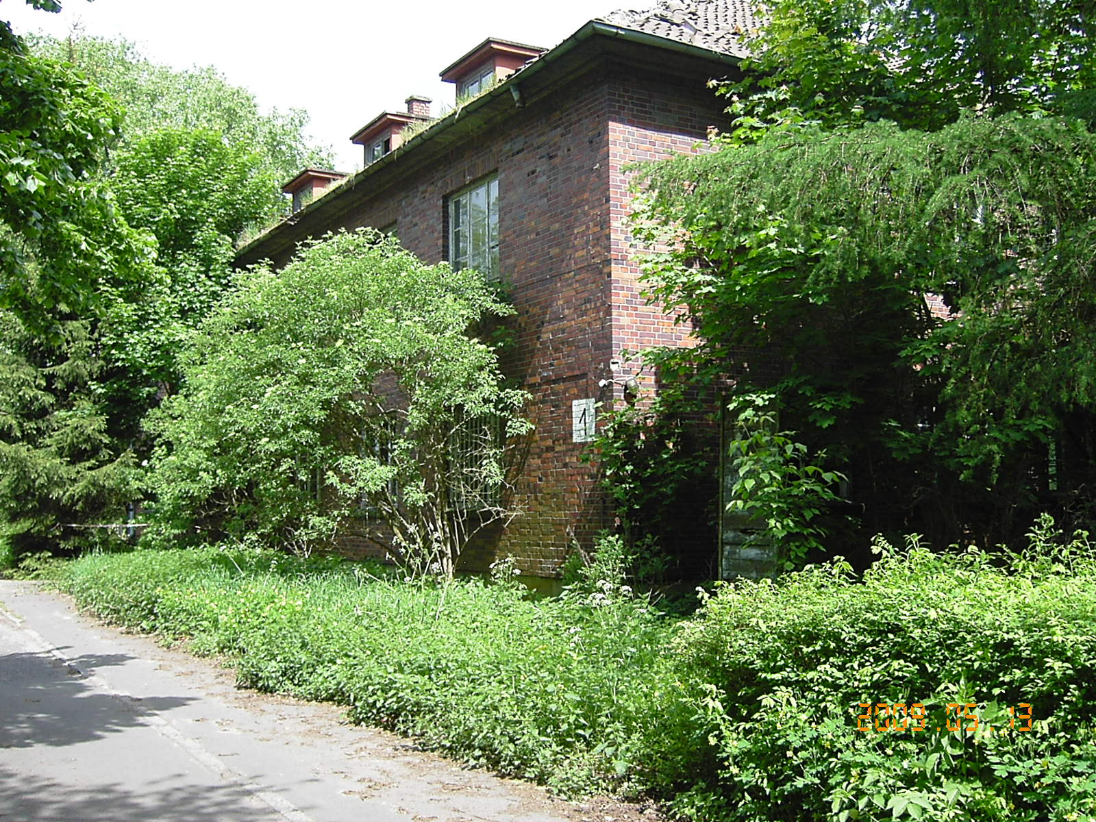 Byłe koszary WOP przy ulicy Przestrzennej w Szczecinie